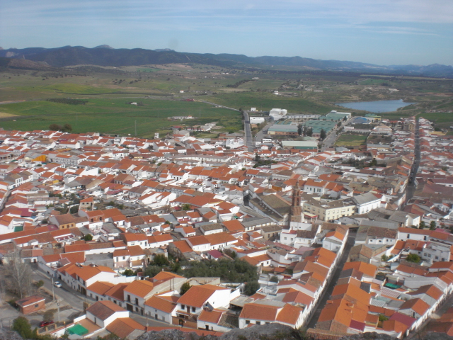 Belmez el la kastelo